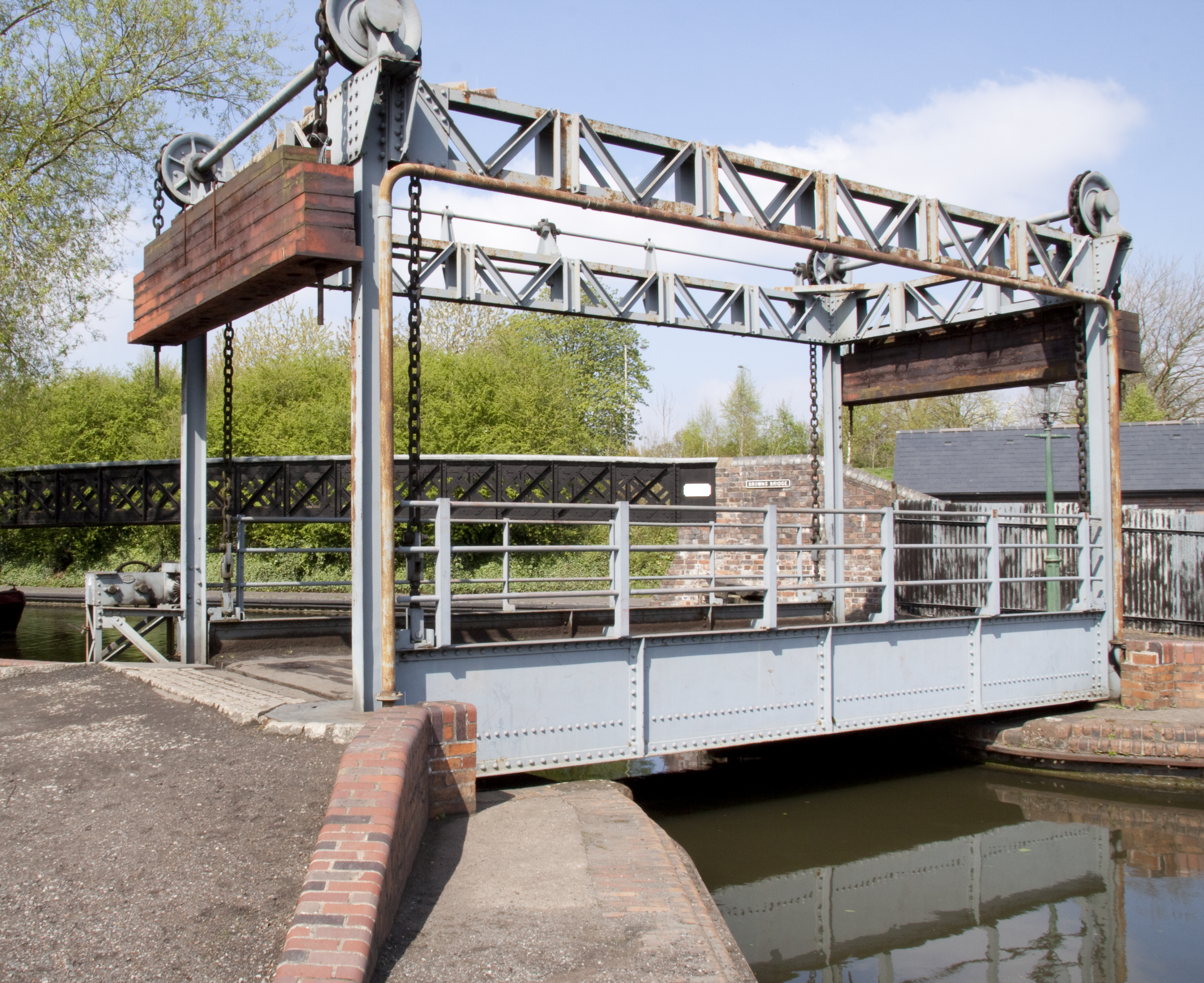 Lifting bridge